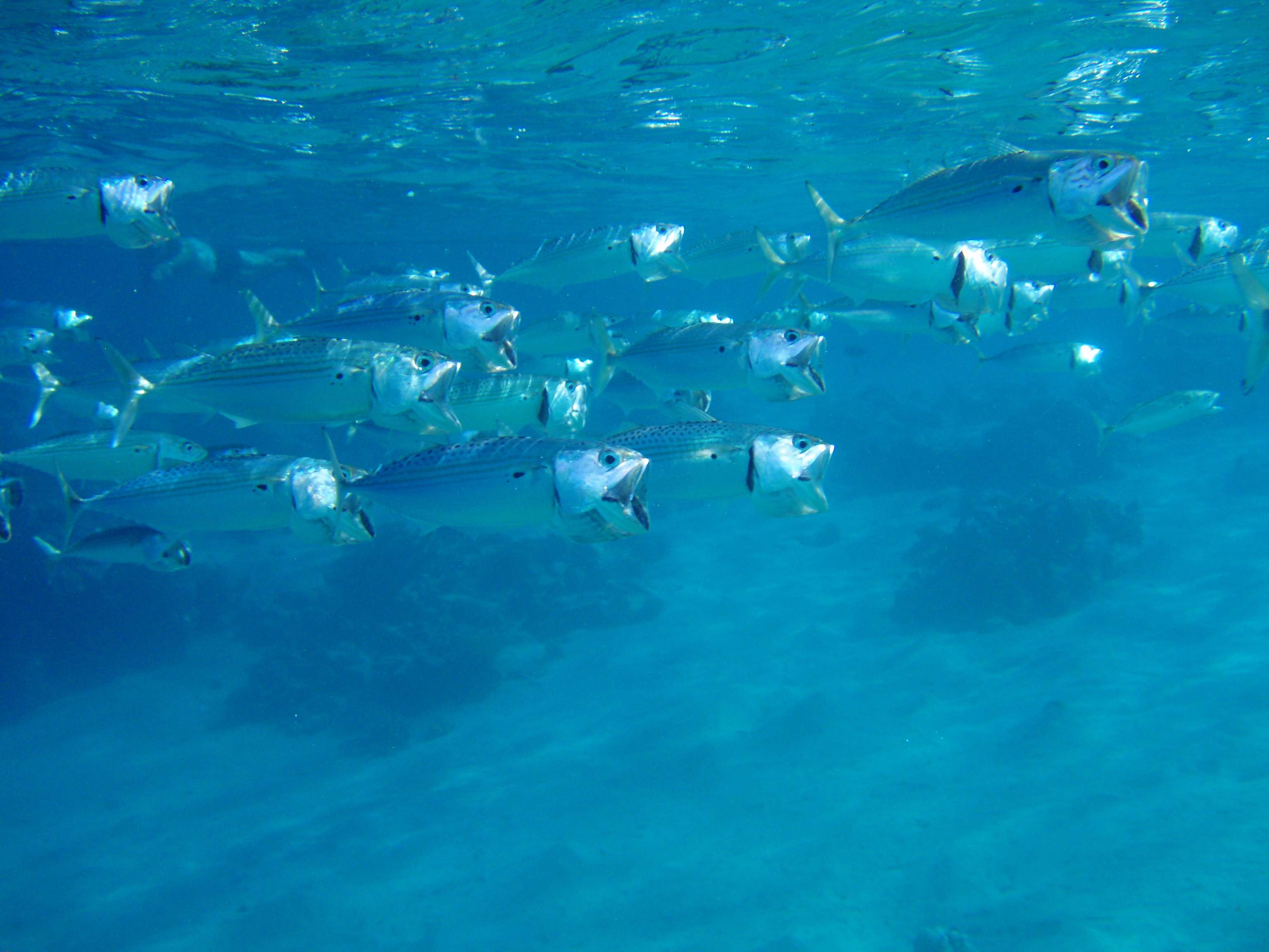 Mackerel